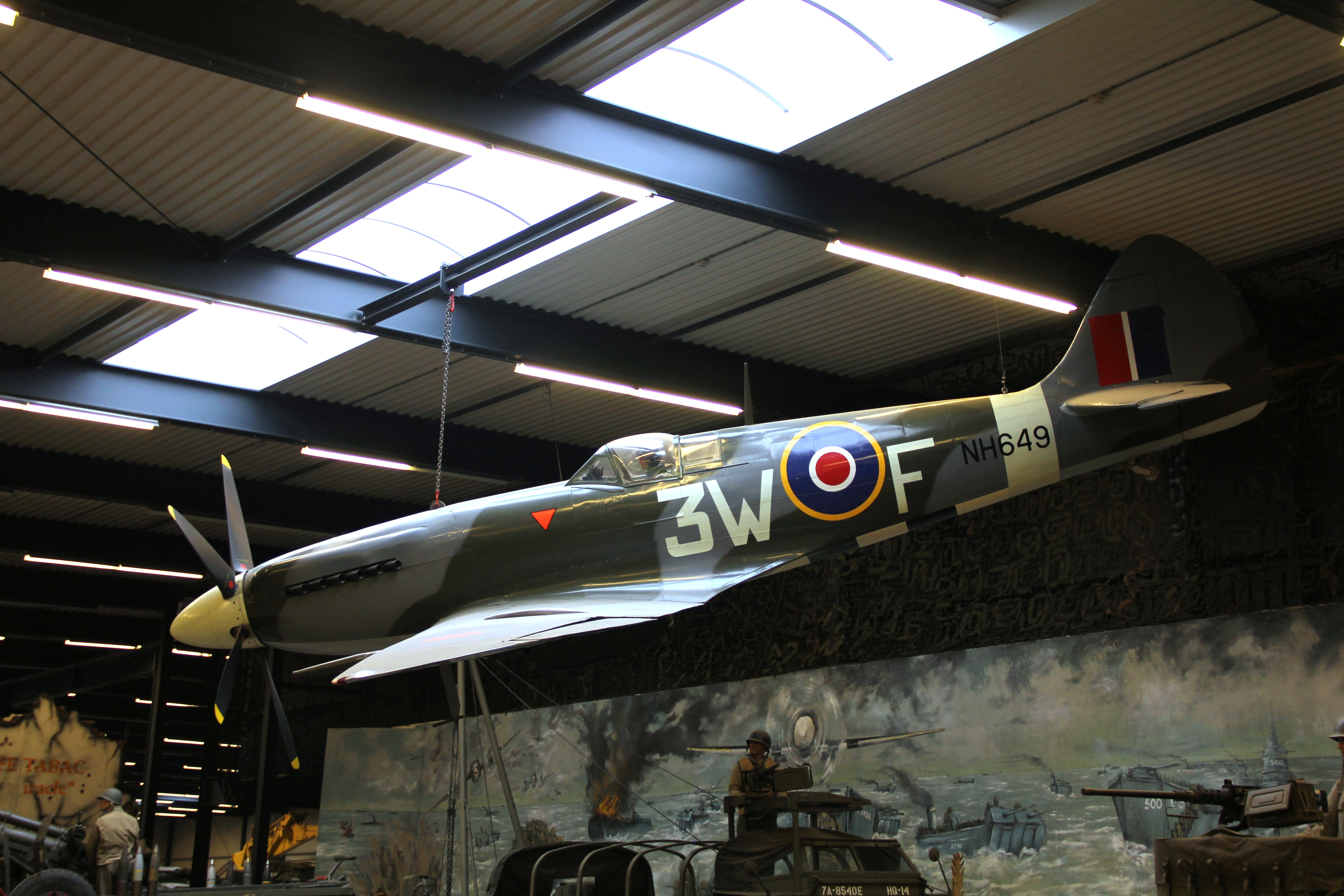 Supermarine Spitfire